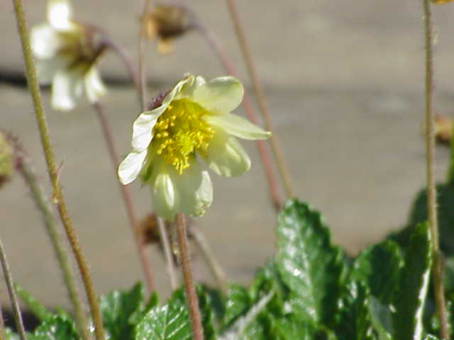 Species: Dryas × suendermannii (D. drummondii × D. octopetala) Family: Rosaceae Image No. 7